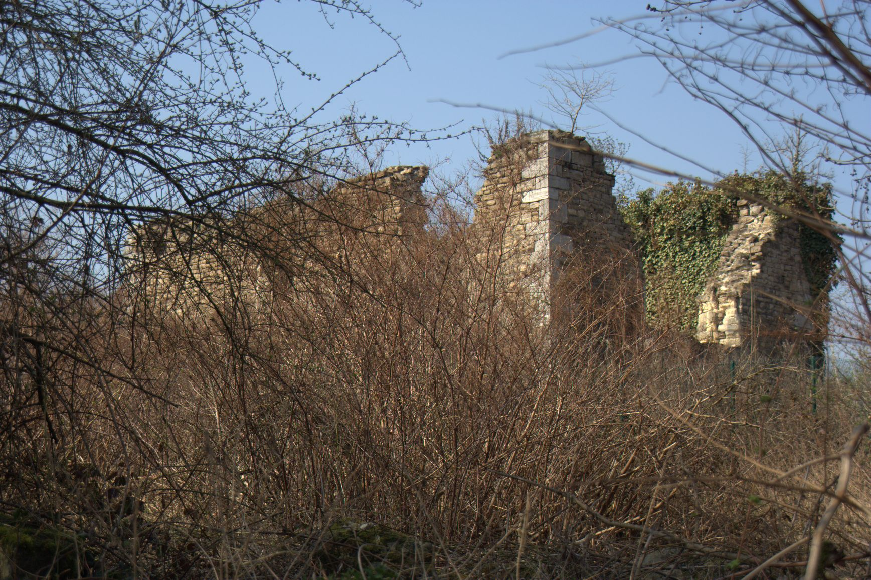 Ruines de l'ancienne chapelle du château de Bouxthay sises chaussée de Brunehaut